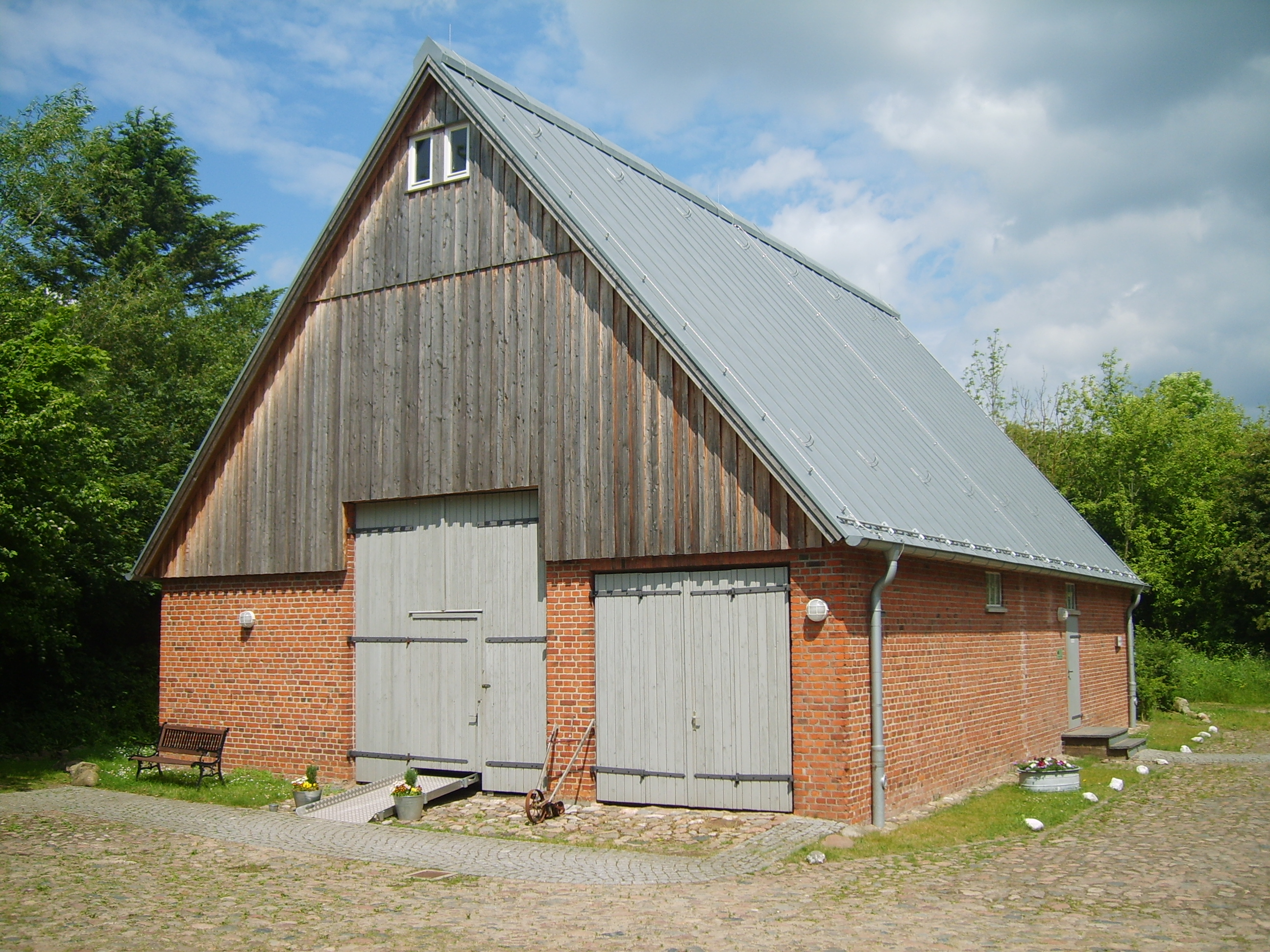 Die westliche Scheune mit Zinkdach